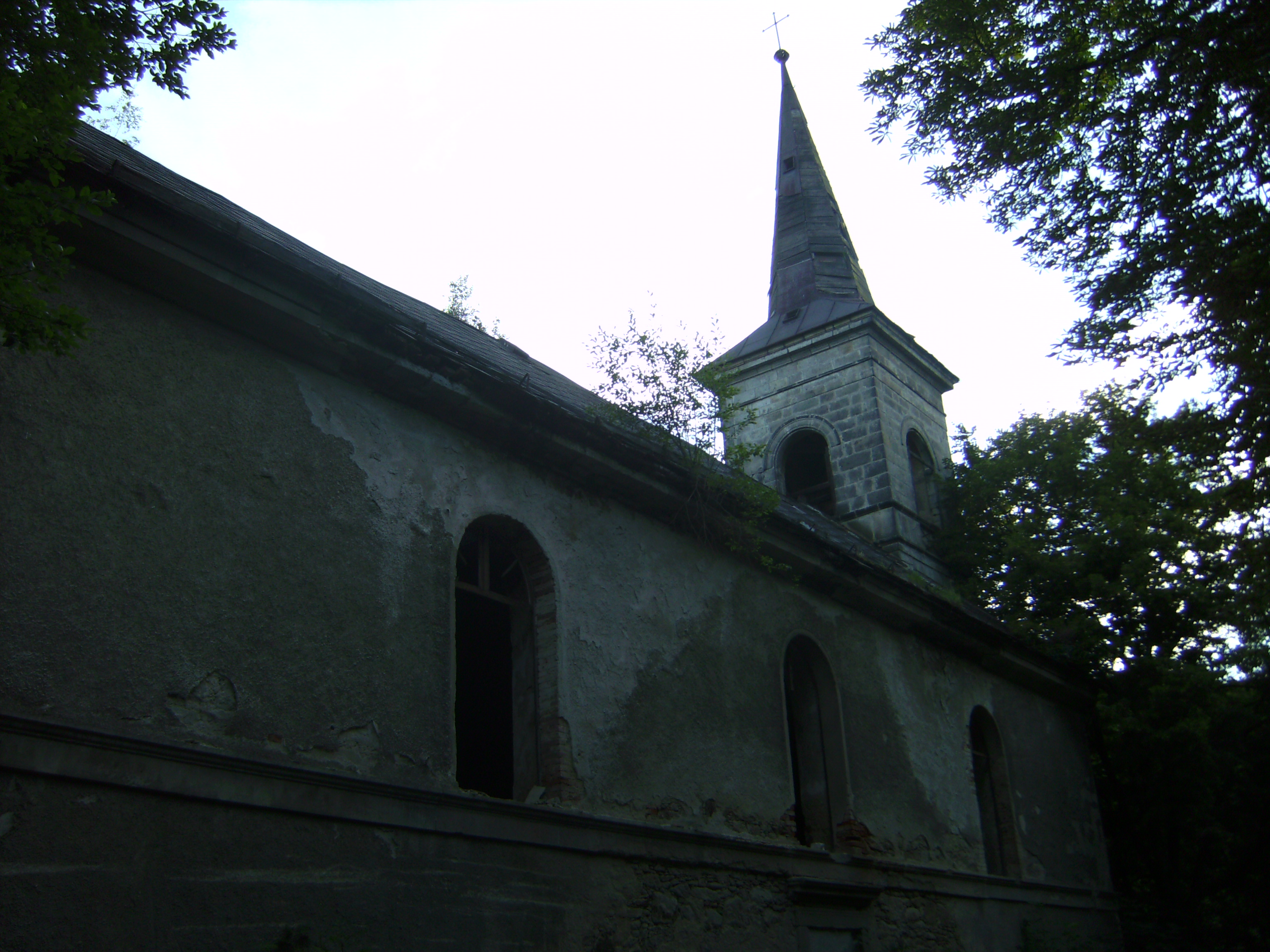 Verfallene Kirche in Neuhäusl